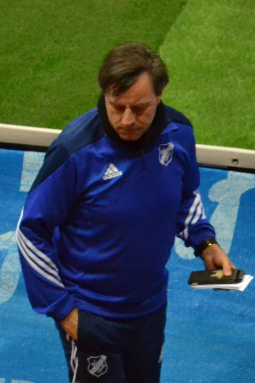 Alexander Fischinger, Trainer des SC Sand, beim SAP Frauen-FußballCup 2016